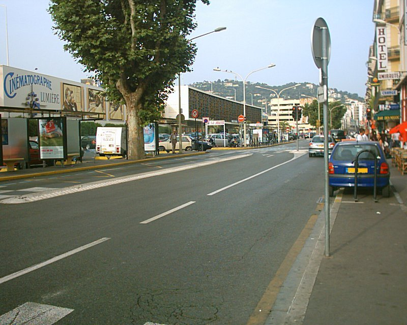 Gare de Cannes-Ville, Cannes.